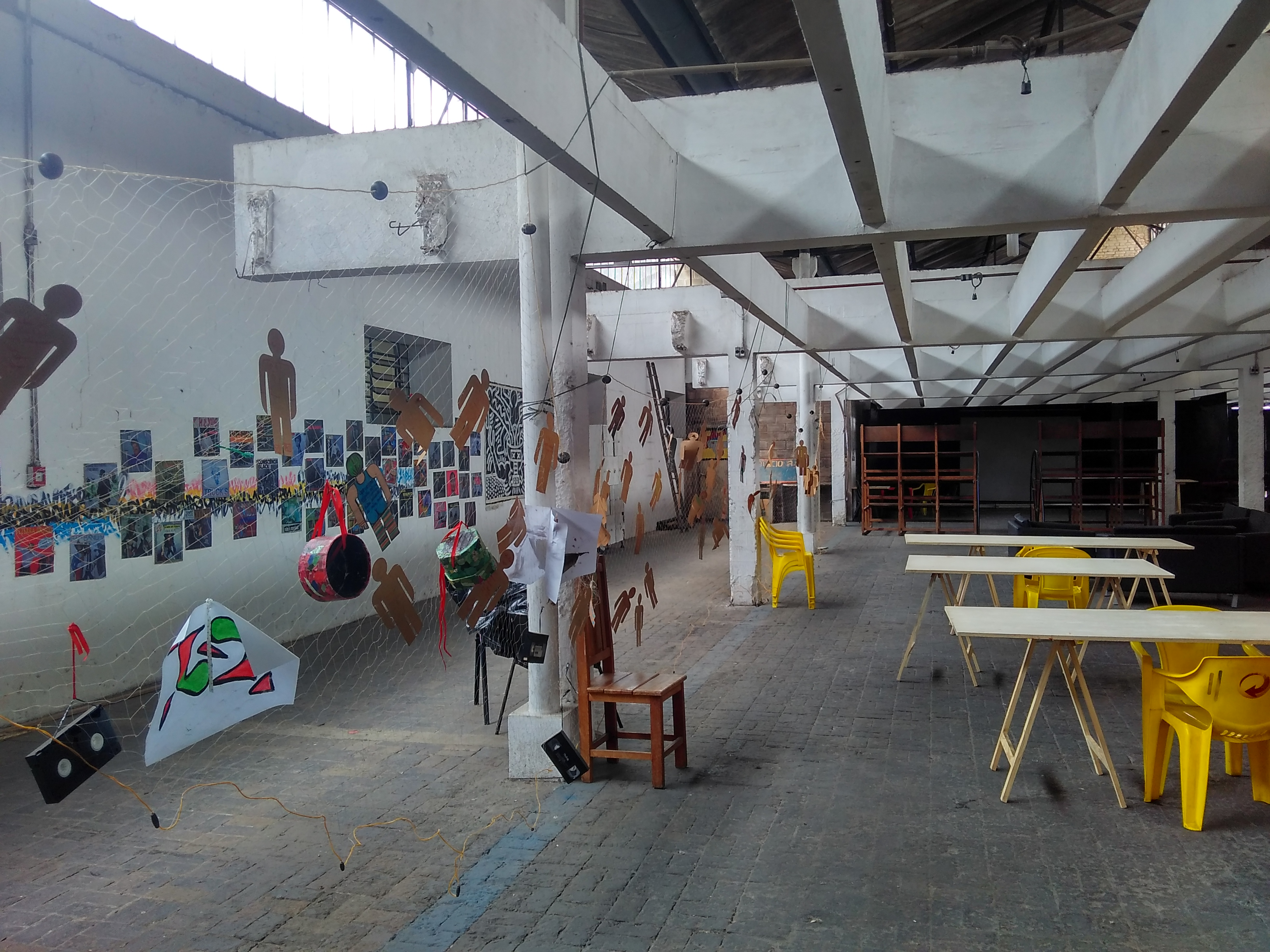 Exposição de trabalhos da área interna do Tendal da Lapa.